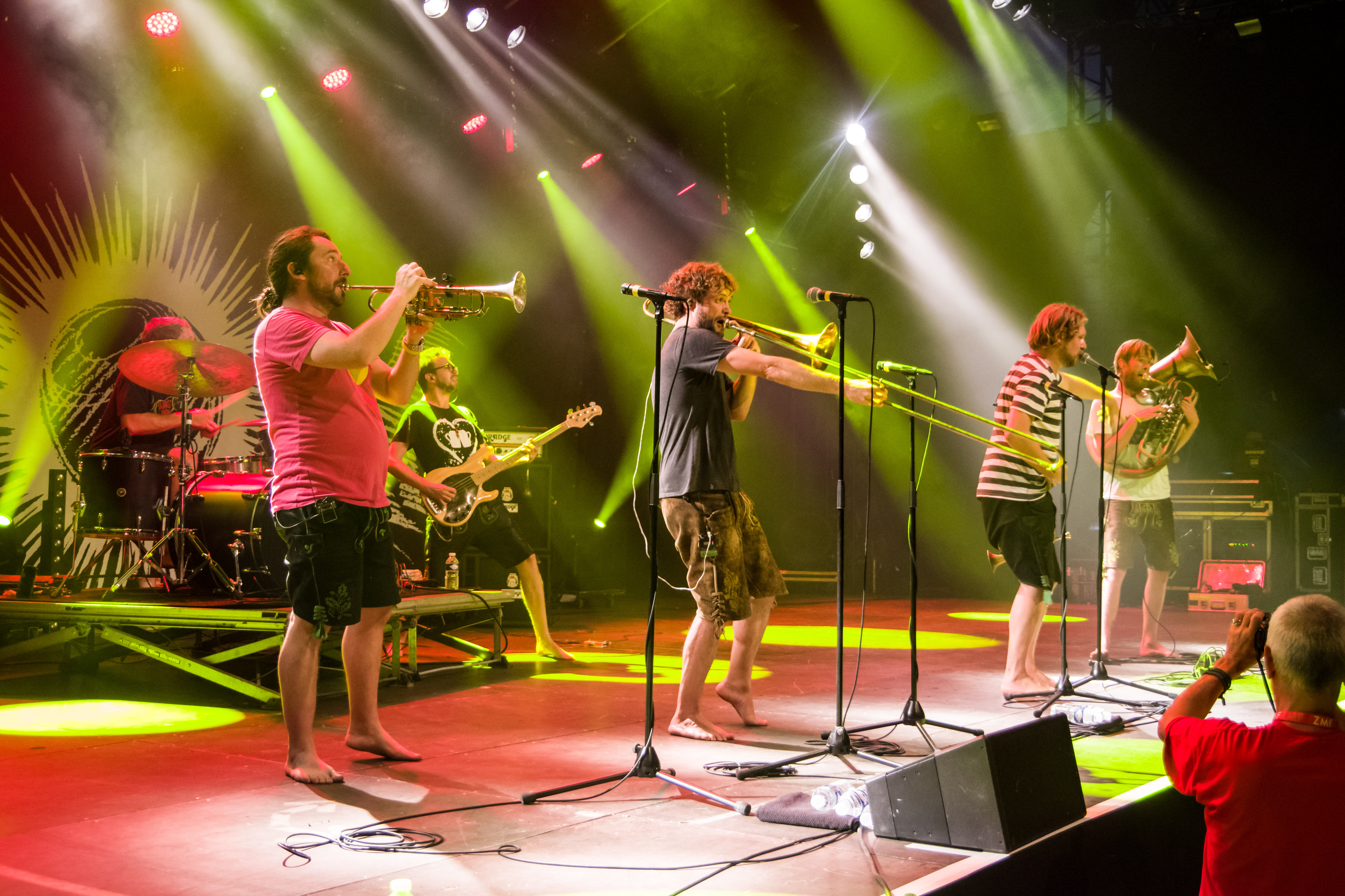 Das Zelt-Musik-Festival 2017 in Freiburg im Breisgau 08.07.2017 LaBrassBanda Trompete, Gesangː Stefan Dettl Tubaː Stefan Huber Posauneː Manuel Winbeck Trompeteː Jörg Hartl Schlagzeugː Manuel da Coll Bassː Mario Schönhofer